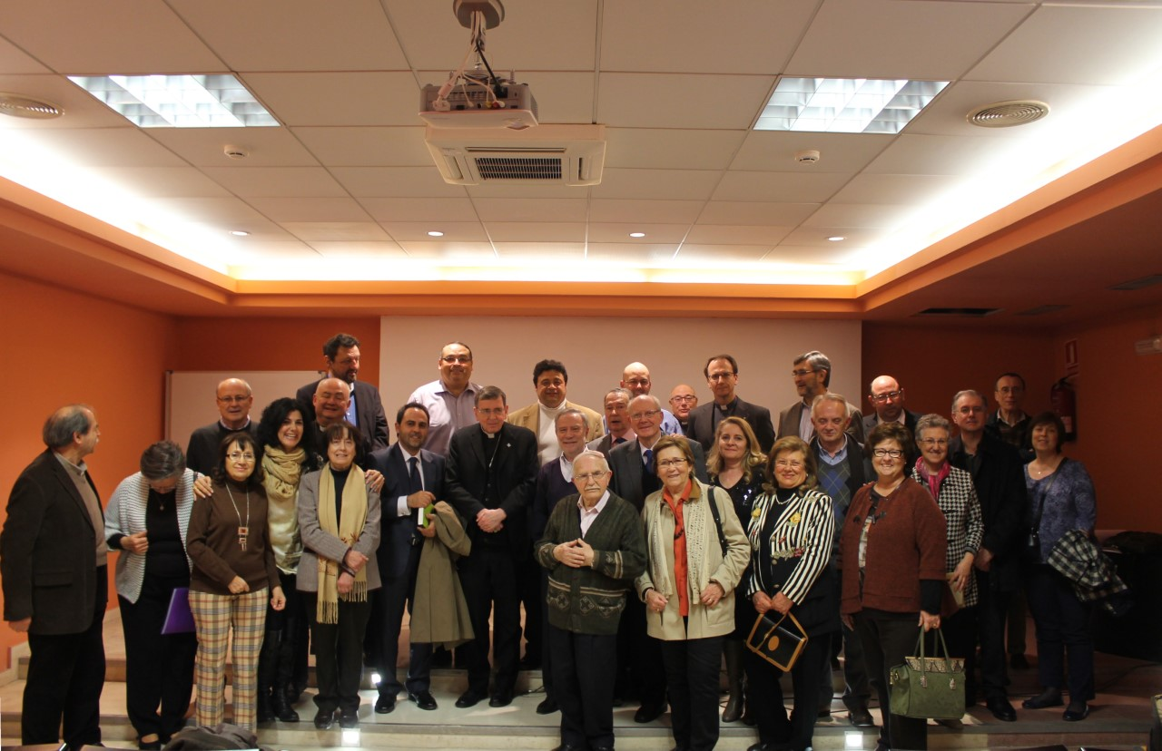 Socios y amigos de Amistad Judeo-Cristiana al finalizar la conferencia del cardenal Kurt Koch en el Salón Bona Gent (Valencia)